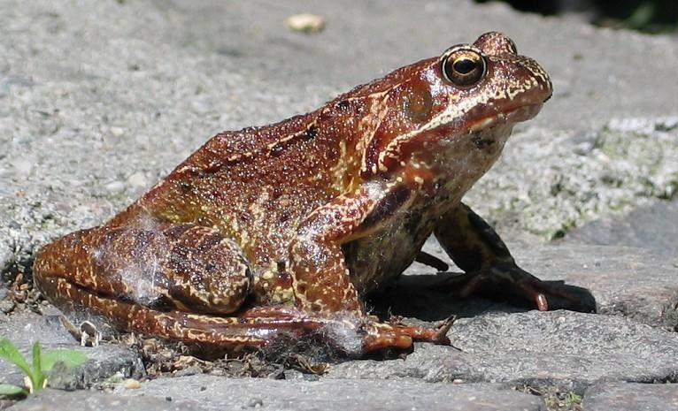 Grasfrosch-Weibchen auf einem Gehweg in Leipzig